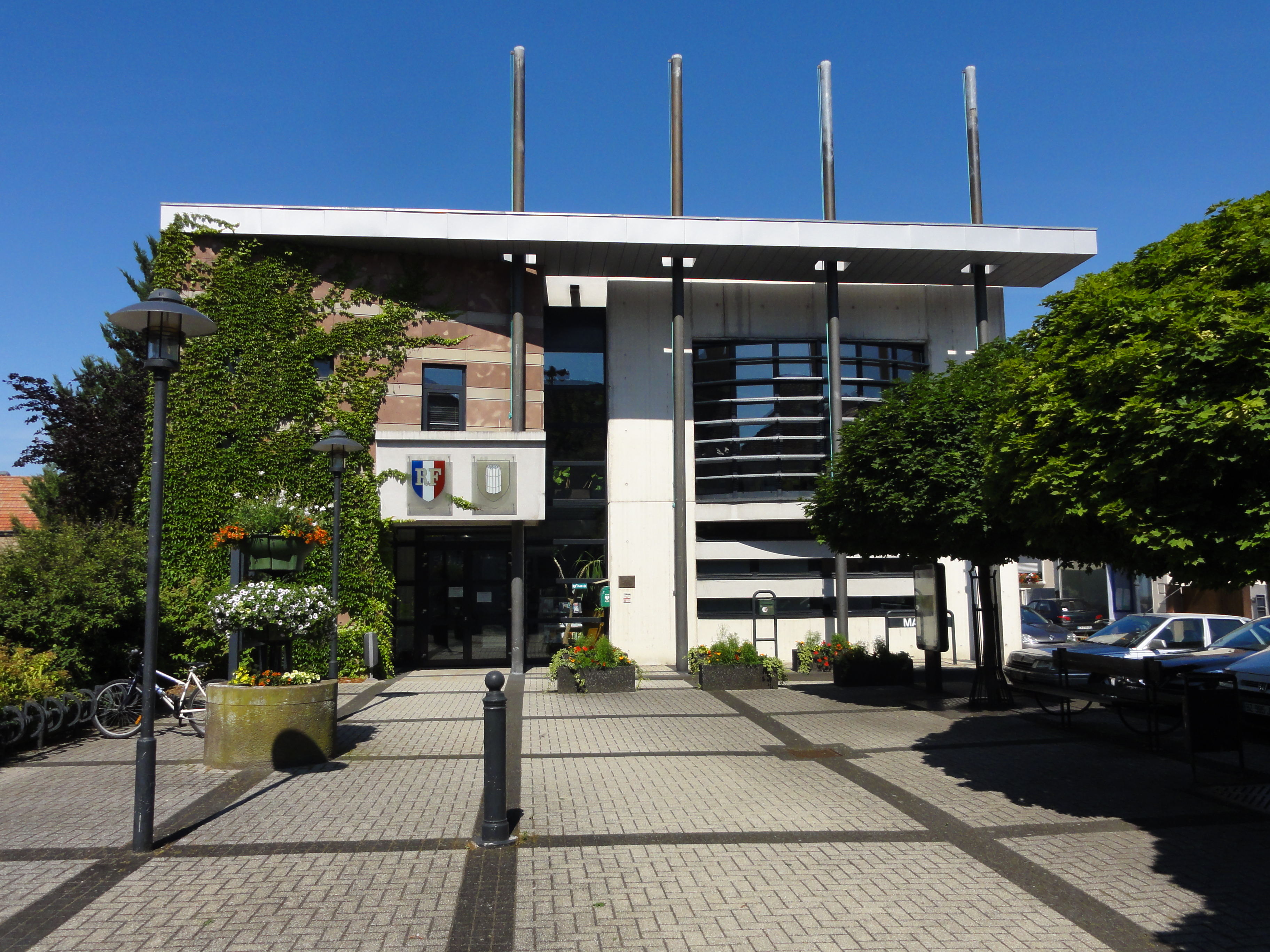 Alsace, Bas-Rhin, Hœrdt, Mairie (XXIe), 1 rue de la Tour.